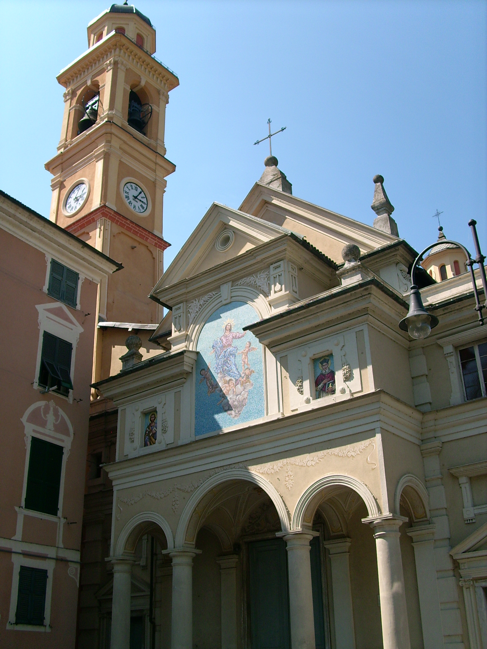 Chiesa di Nostra Signora Assunta di Rossiglione Inferiore, Liguria, Italia